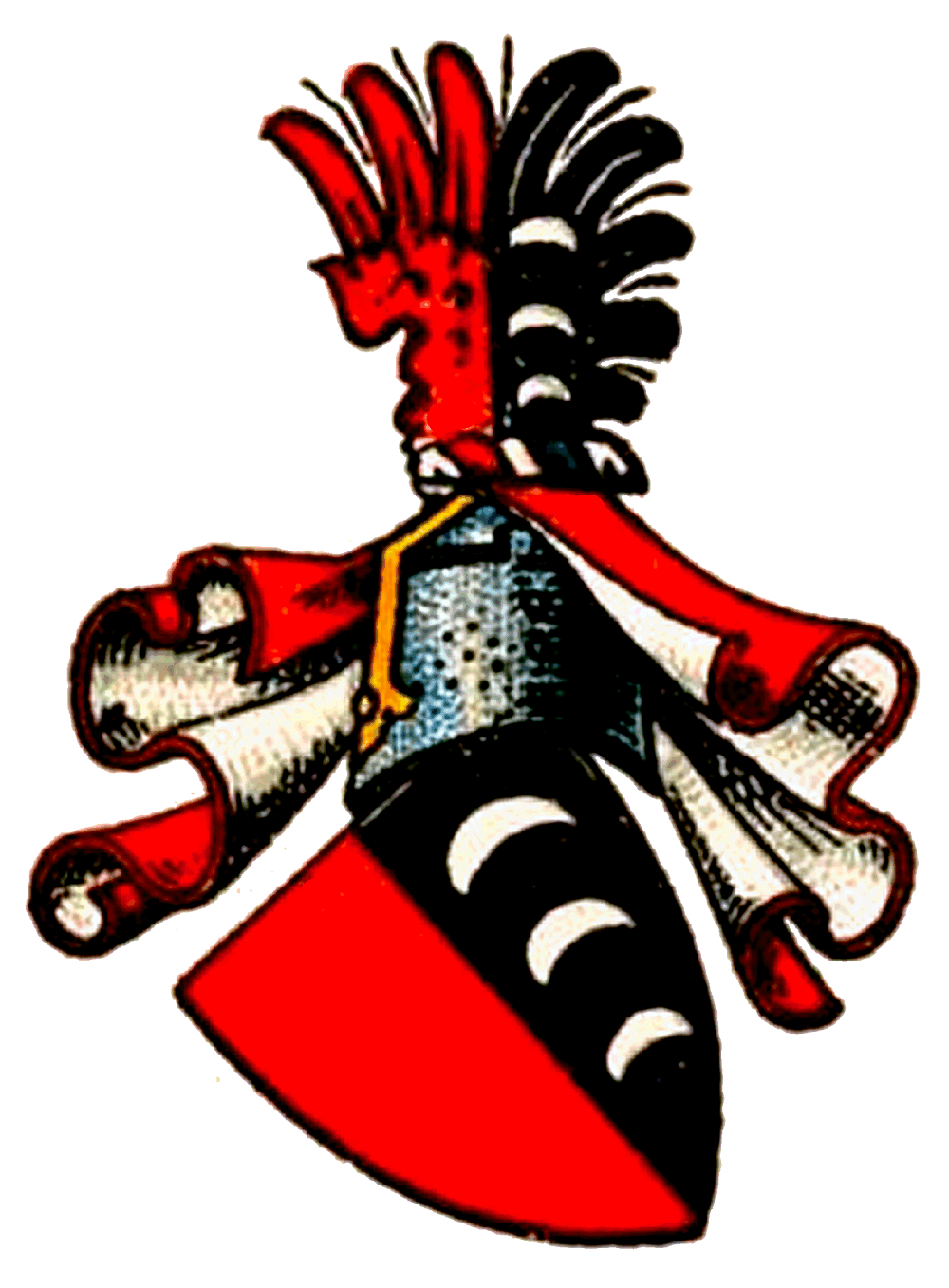 Wappen derer von Schrottenberg